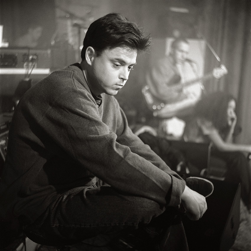 Gitarrist und Komponist Frank Kuruc beim Freundeskreis Soundcheck